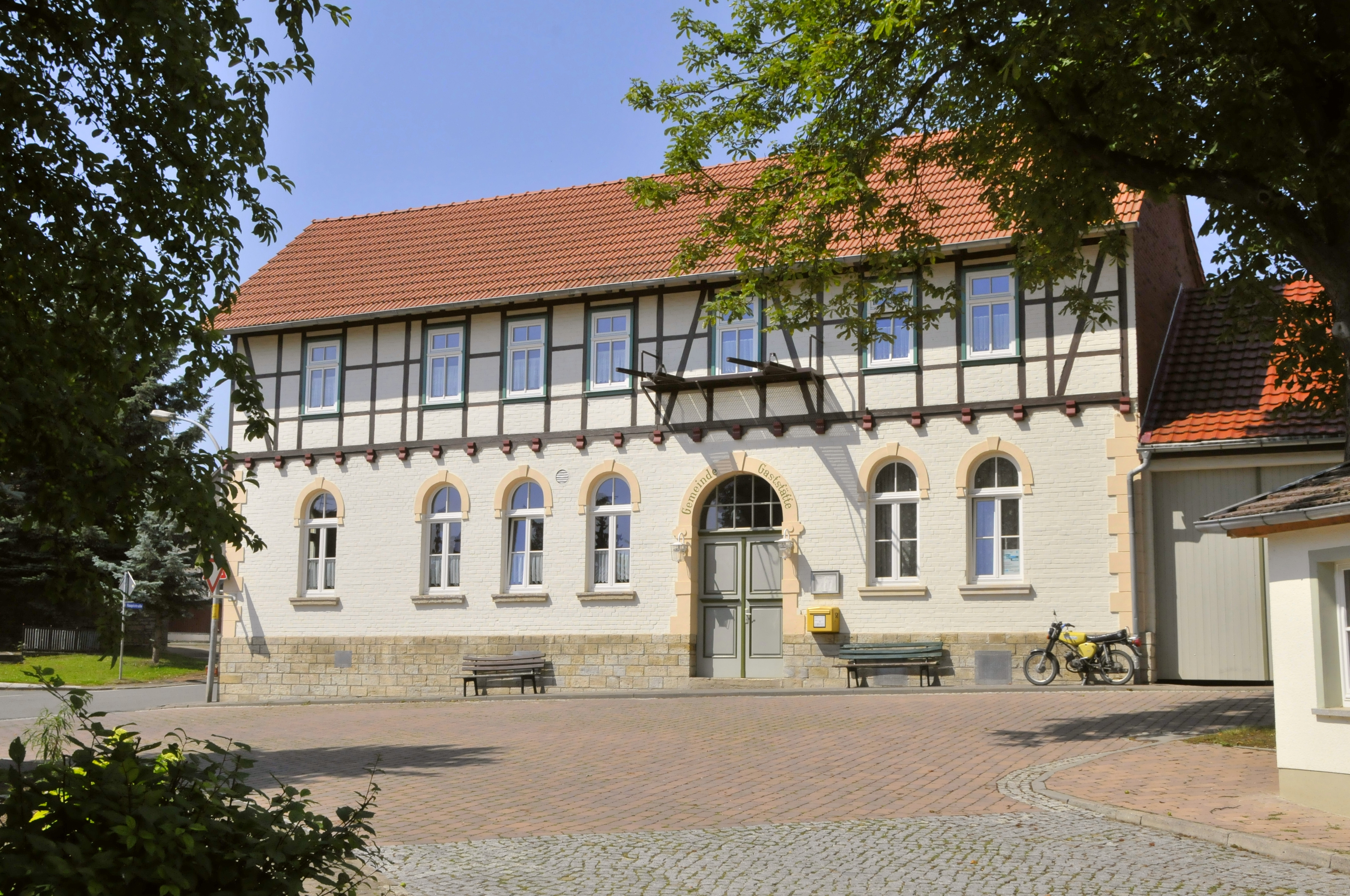 Hornsömmern, Gemeindegaststätte am Anger